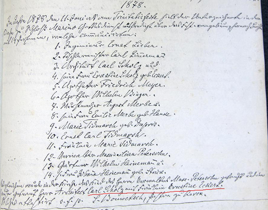 Запись о венчании Карла и Эрнестины Шольц.